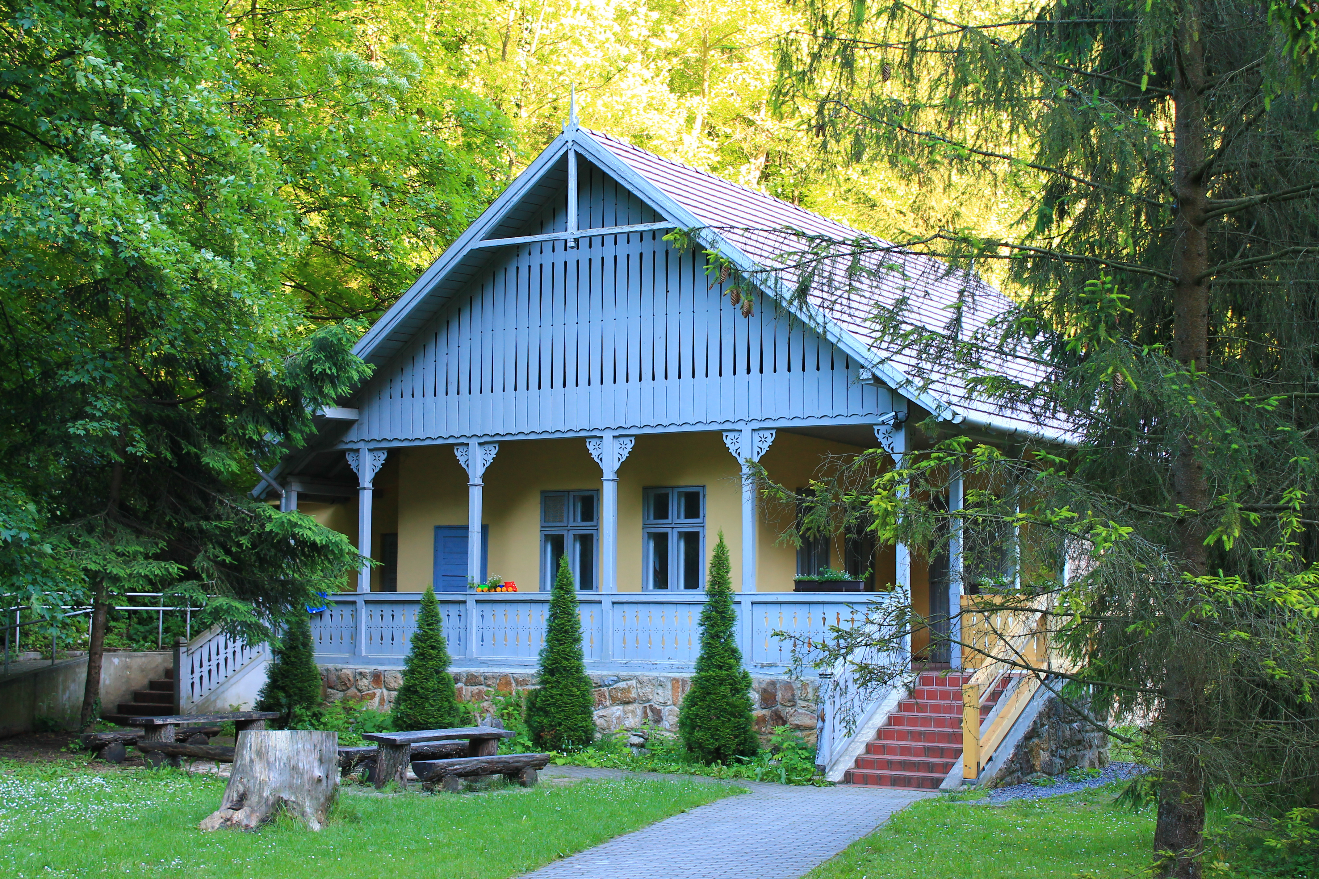 Herman Ottó nyaralója This is a photo of a monument in Hungary. Identifier: 2994